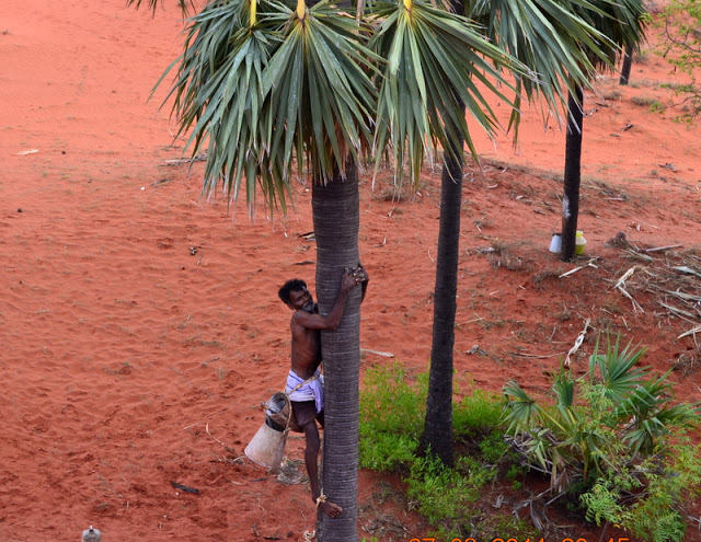 திசையன்விளைக்கருகே தேரிக்காட்டில் பனையேறும் தொழிலாளி